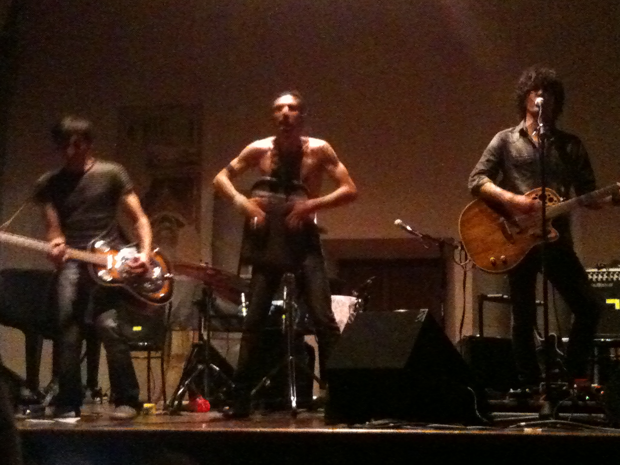 Gli Zen Circus suonano ad un concerto a Firenze durante il loro "Busking Tour" del 15 aprile 2012